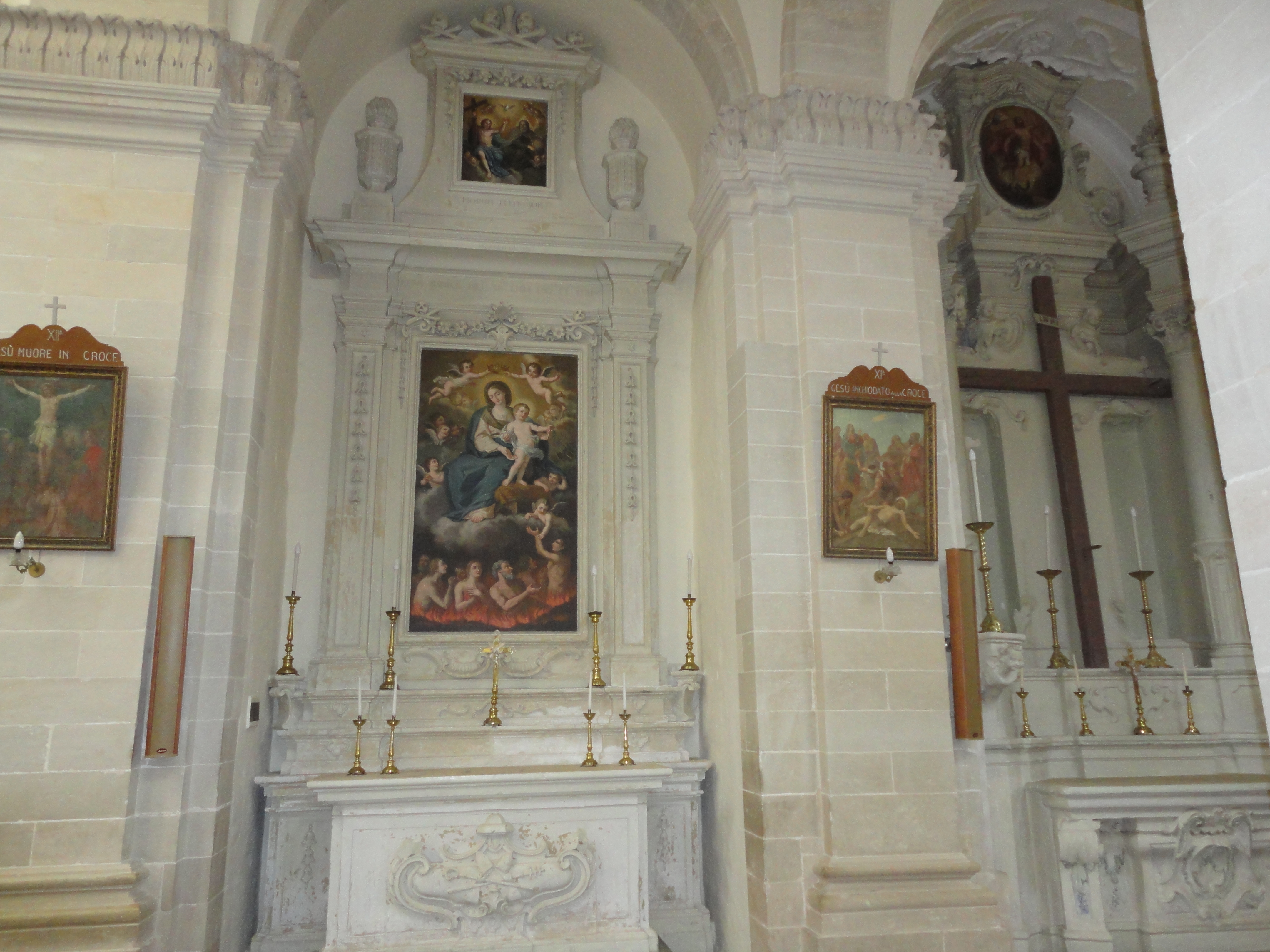 Chiesa Uggiano la Chiesa Altari sant'Orsola e santa Croce, Lecce